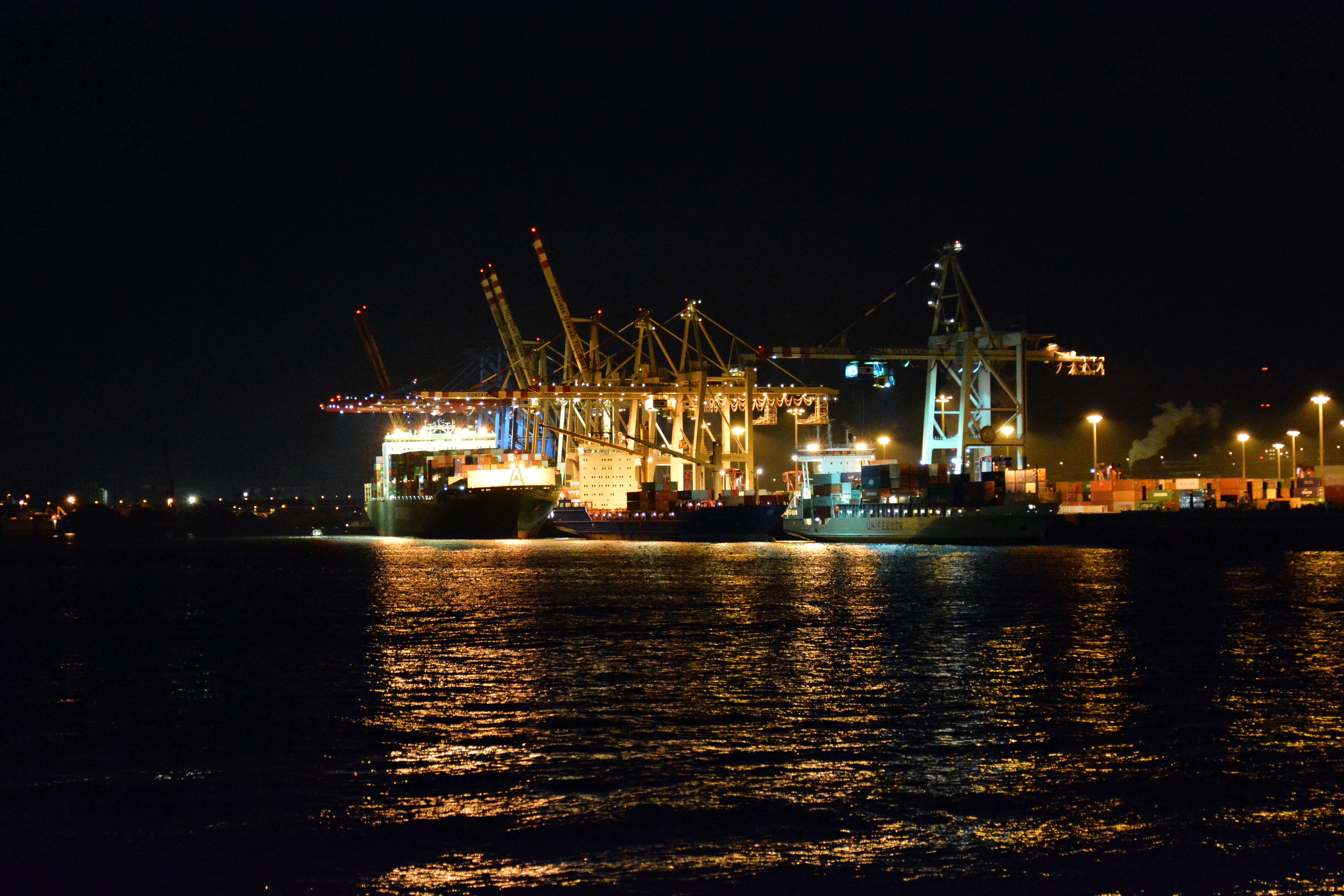 Container Terminal Tollerort am Abend